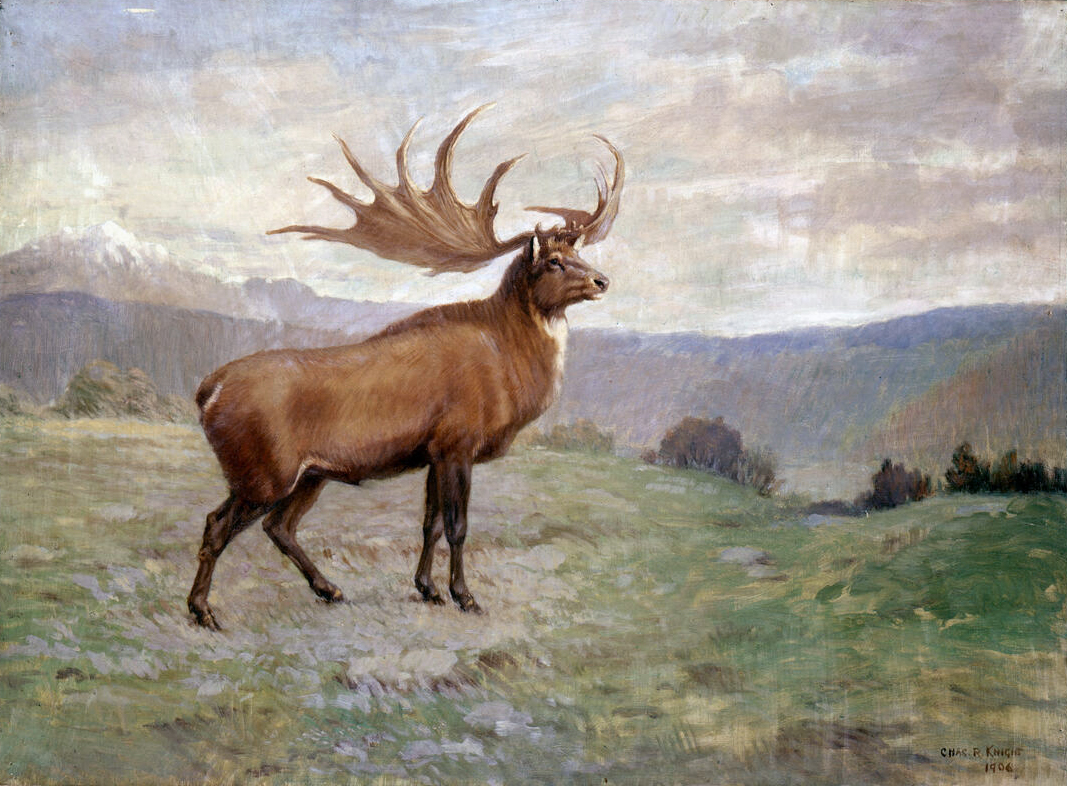 Megaloceros